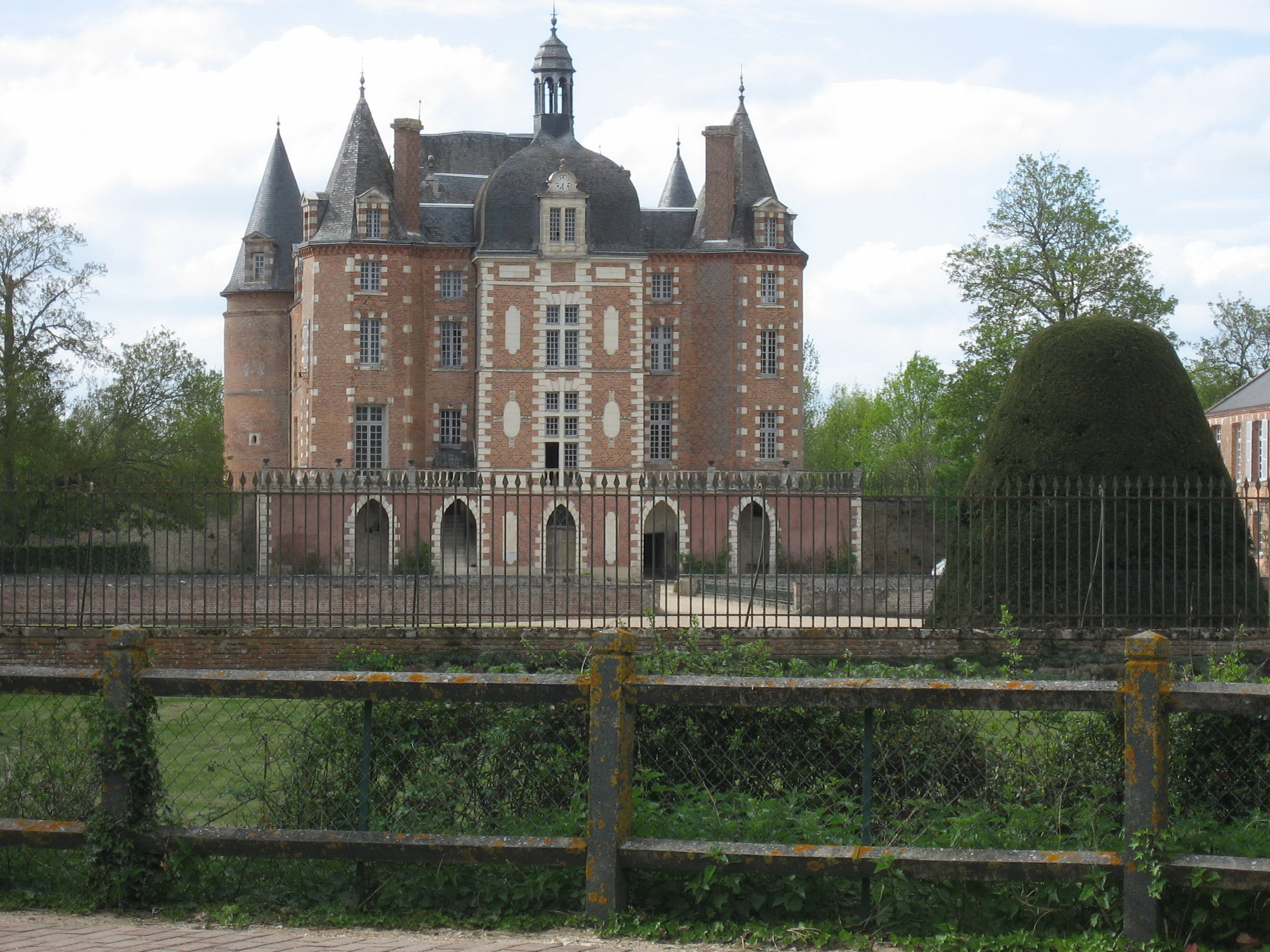 Monument historique du Loir-et-Cher